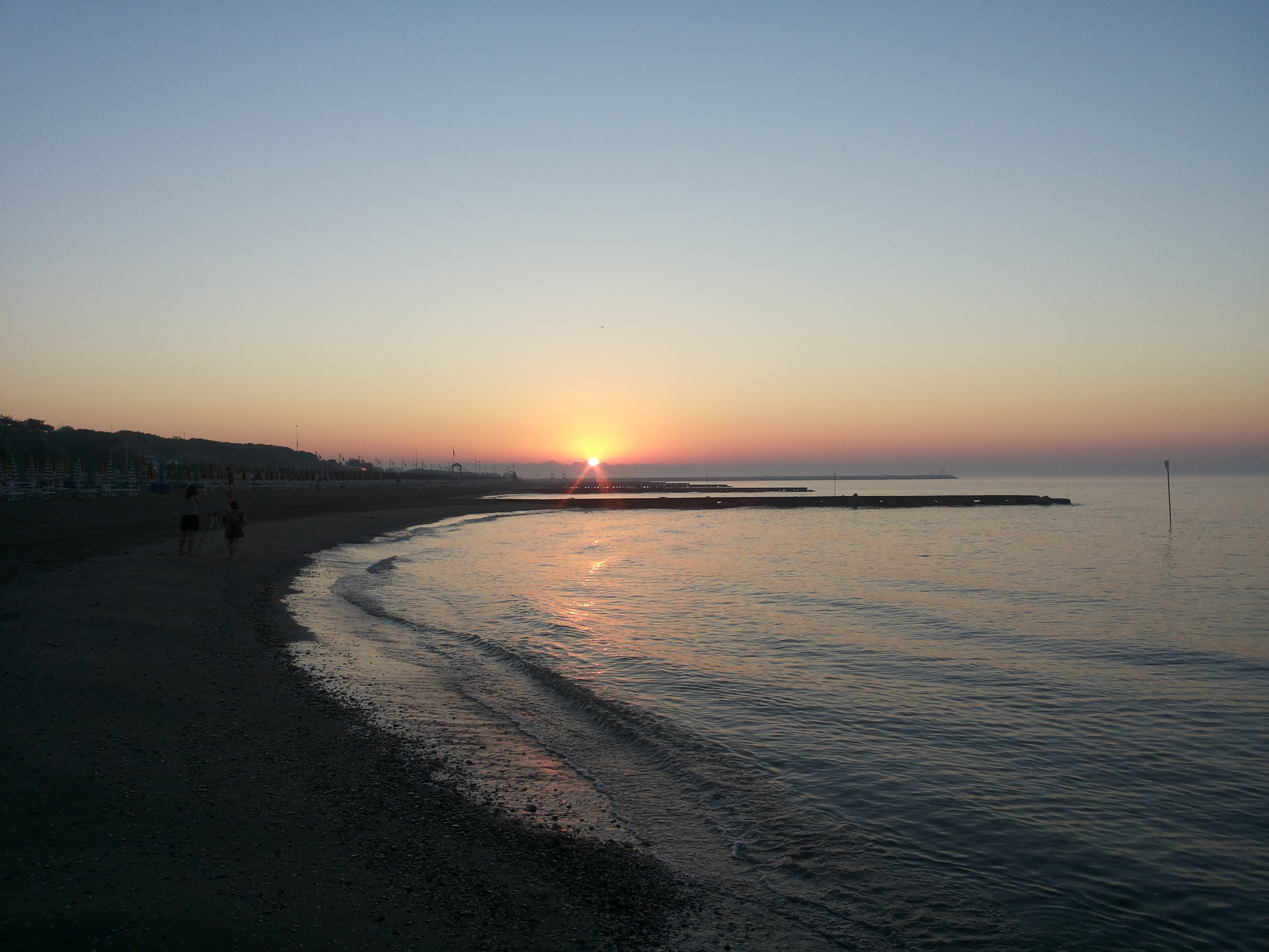 30021 Porto Santa Margherita VE, Italy